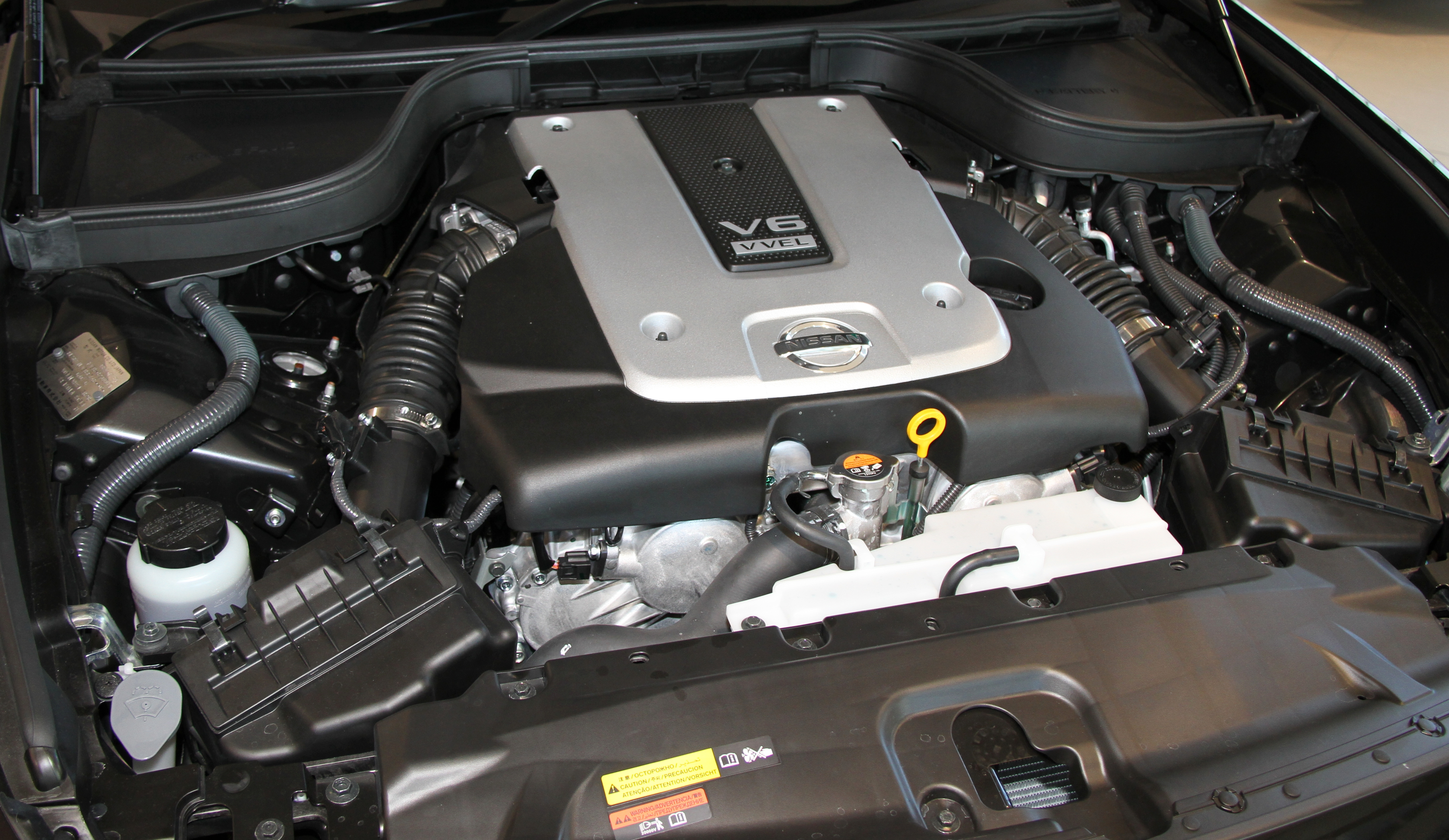 Nissan Skyline